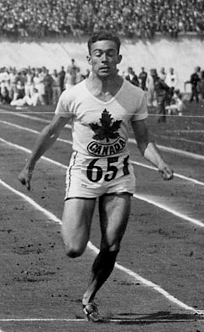 Olympische Spelen 1928 Amsterdam, Nederland : John Fitzpatrick.